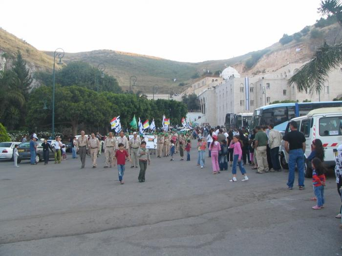 צופי בתי הספר הדרוזים בצעדת נבי שועיב (יתרו) ליד קרני חטים. בצעדה זו משתתפים מדי שנה כ 3000 צופים.